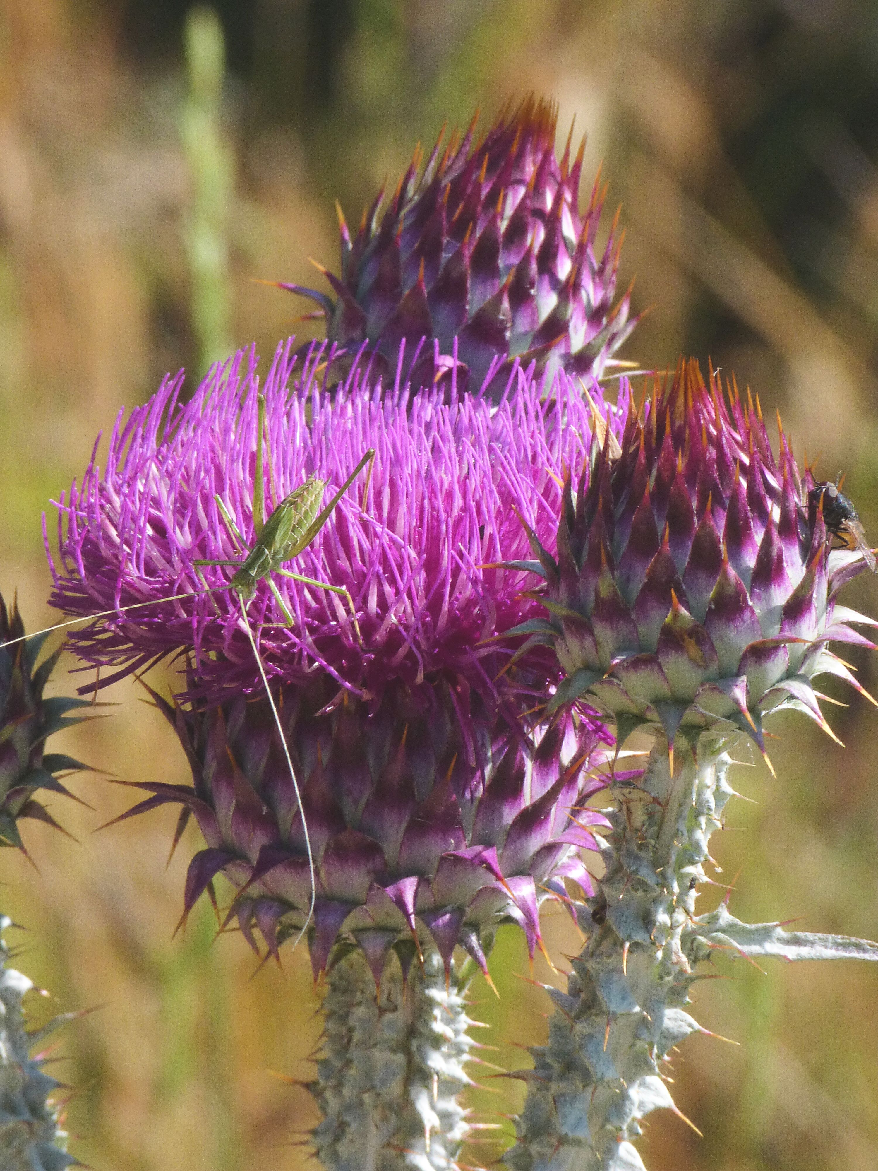 Distel -Onopordum illyricum- mit ?